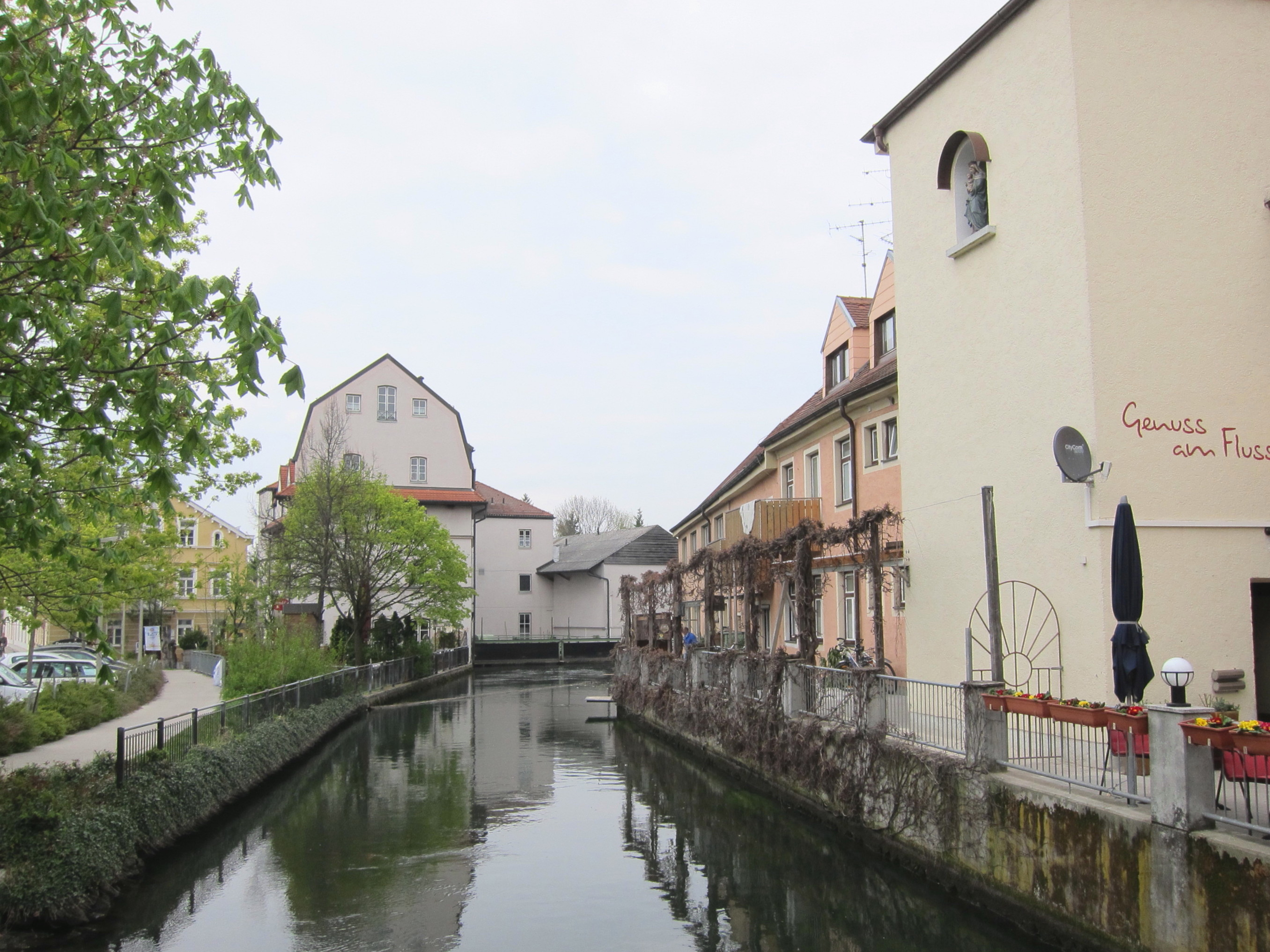 Erding, Sempt im Mühlgraben in Erding unterhalb des "Schönen Tors"